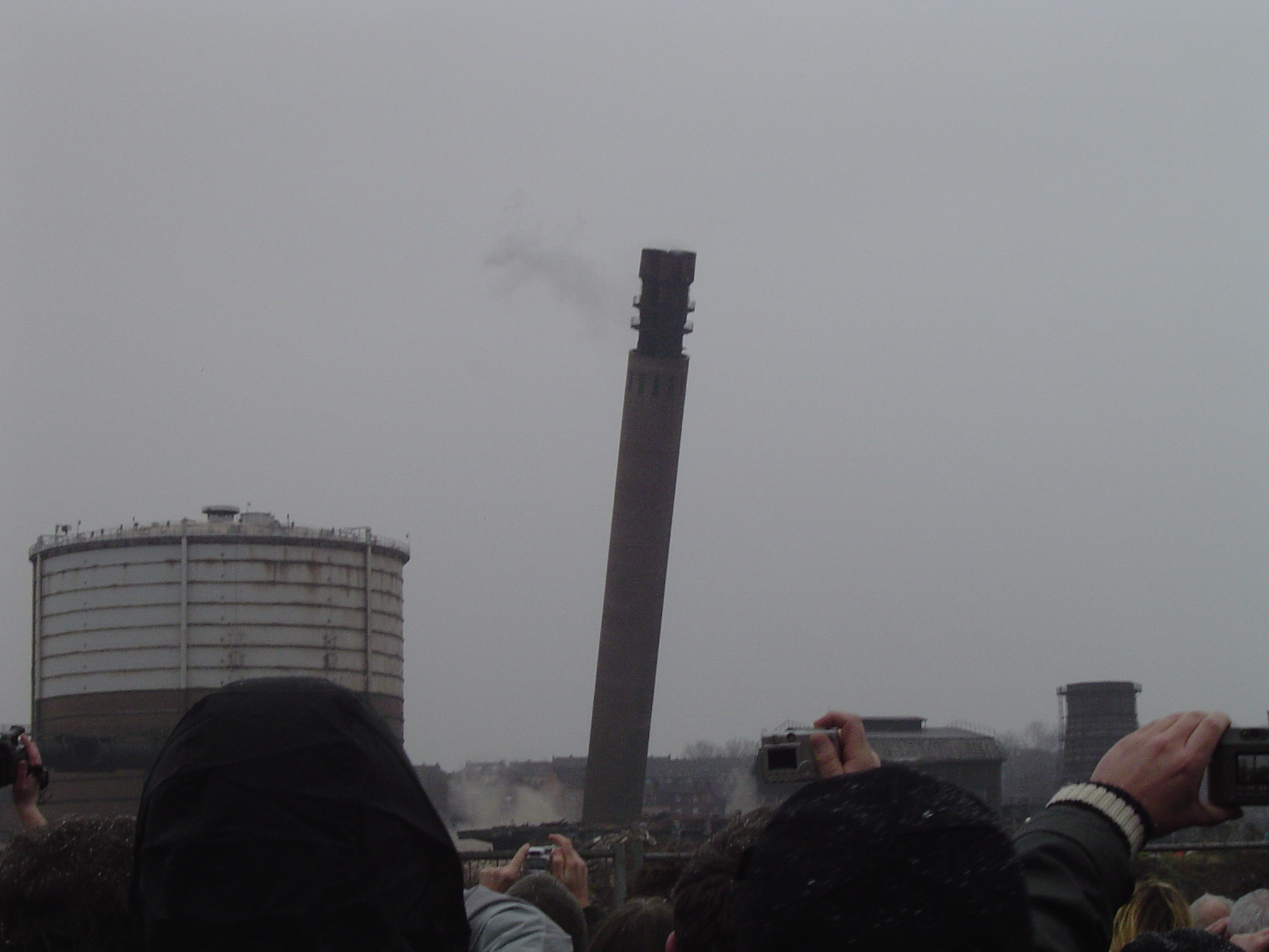 Die Sprengung der „Hörder Fackel“ des ehem. Stahlwerks Phoenix Ost